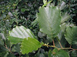 Alnus glutinosa